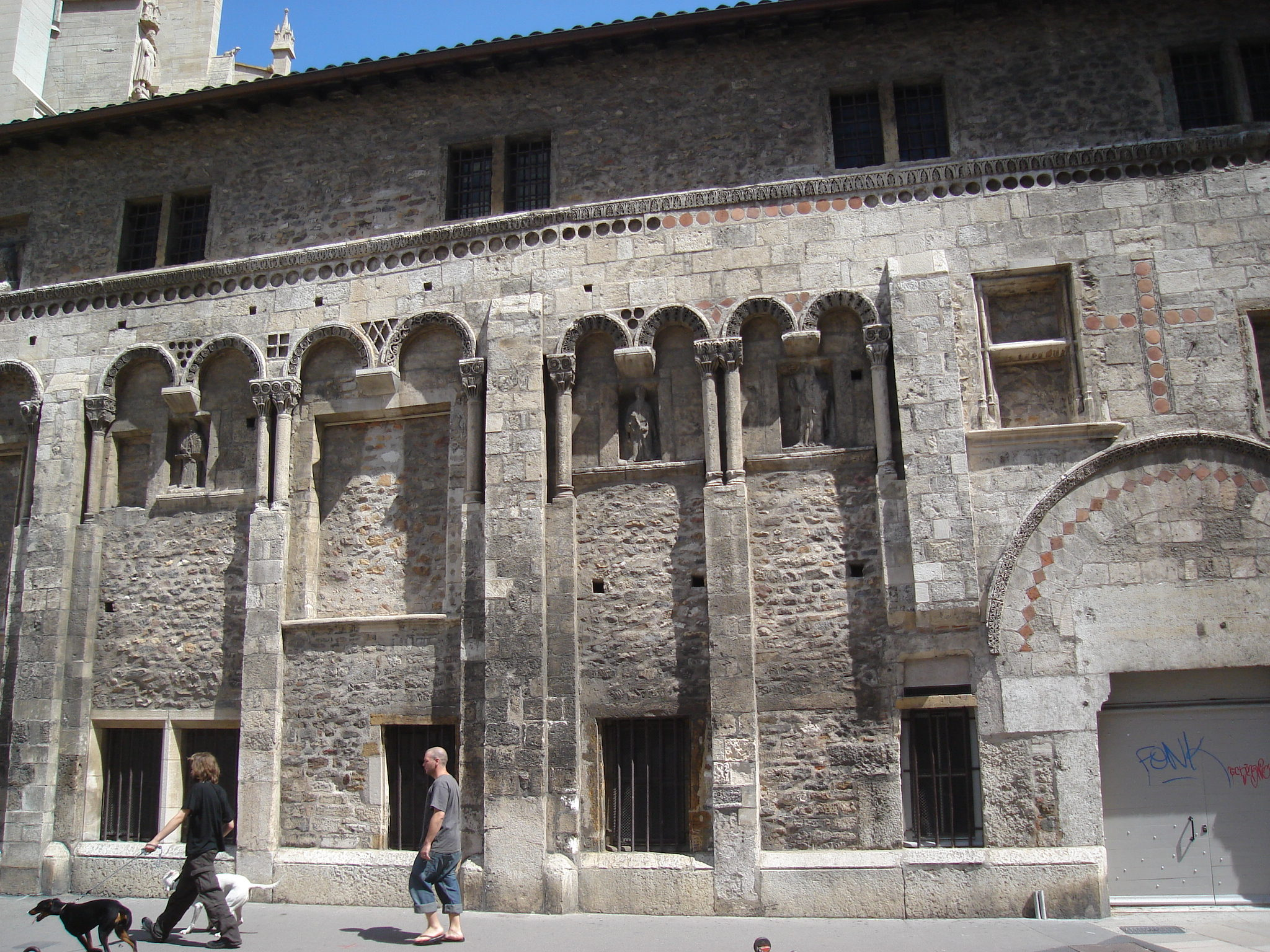 façade de la manécanterie